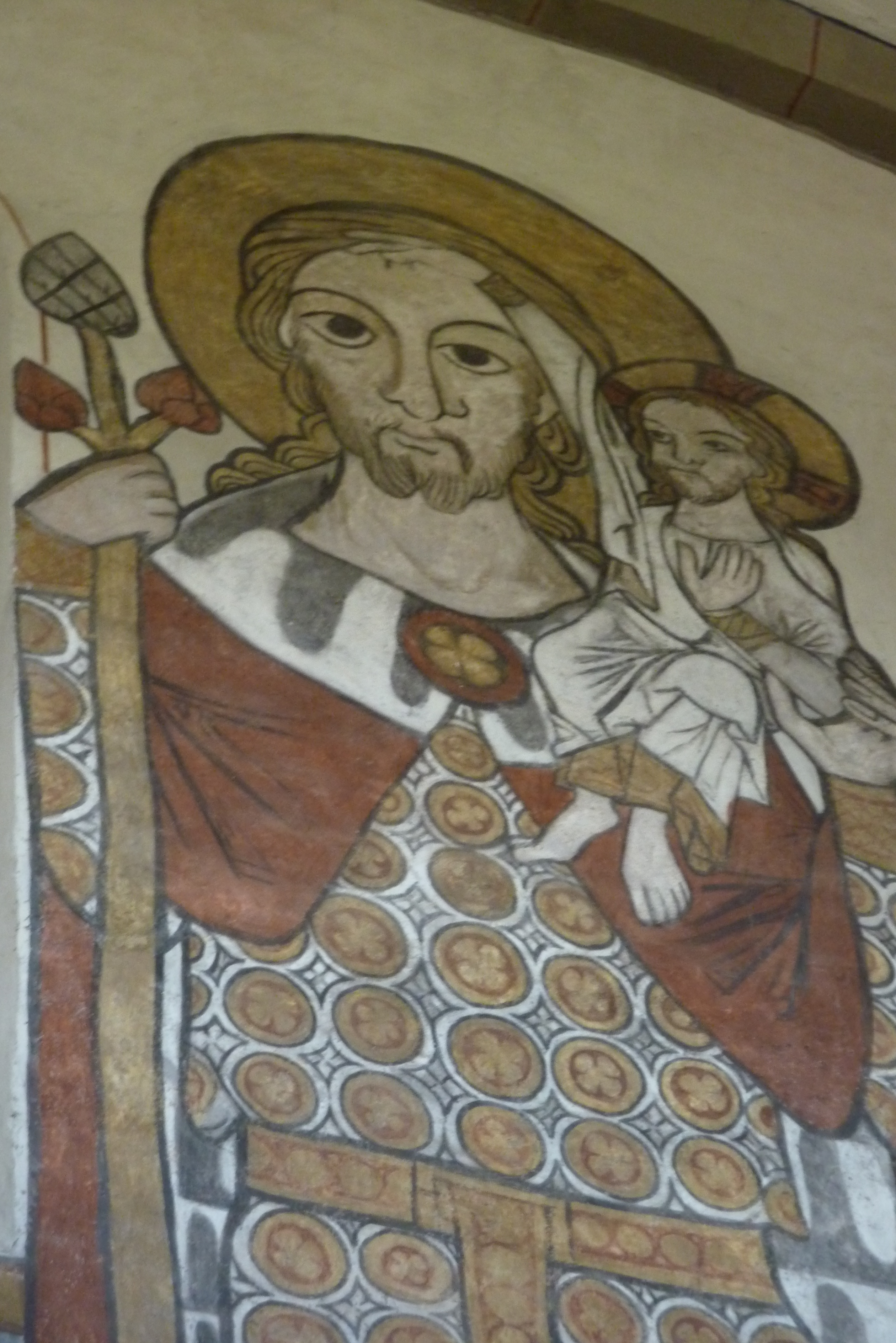 Katholische Pfarrkirche St. Cyriakus in Niedermendig, Wandmalerei Mitte 13. Jahrhundert, hl. Christophorus